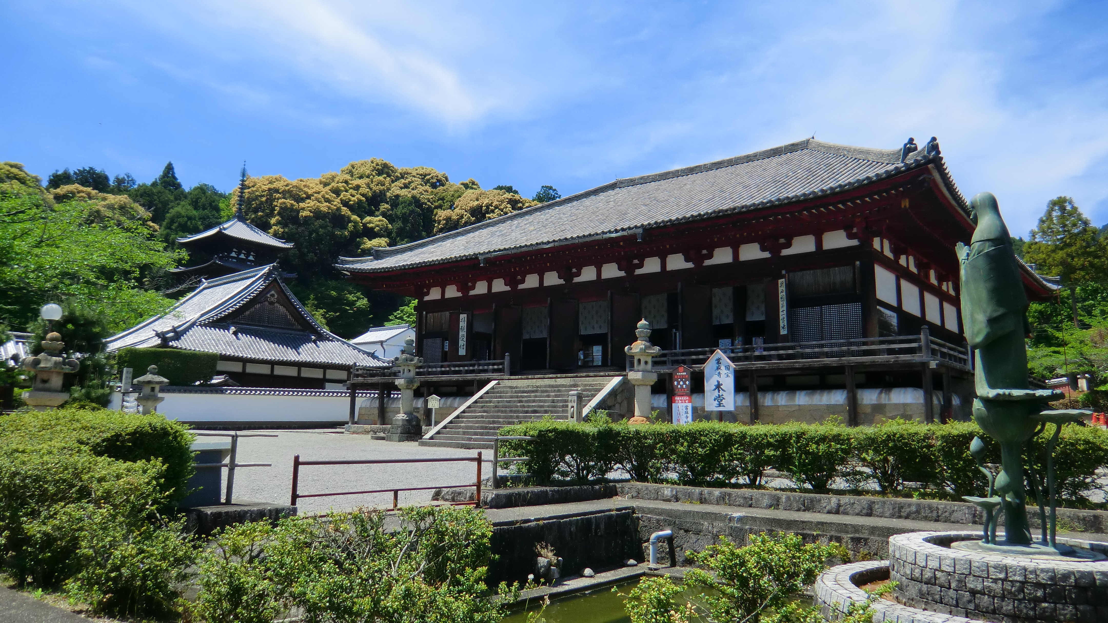 當麻寺曼陀羅堂 (2019年5月)